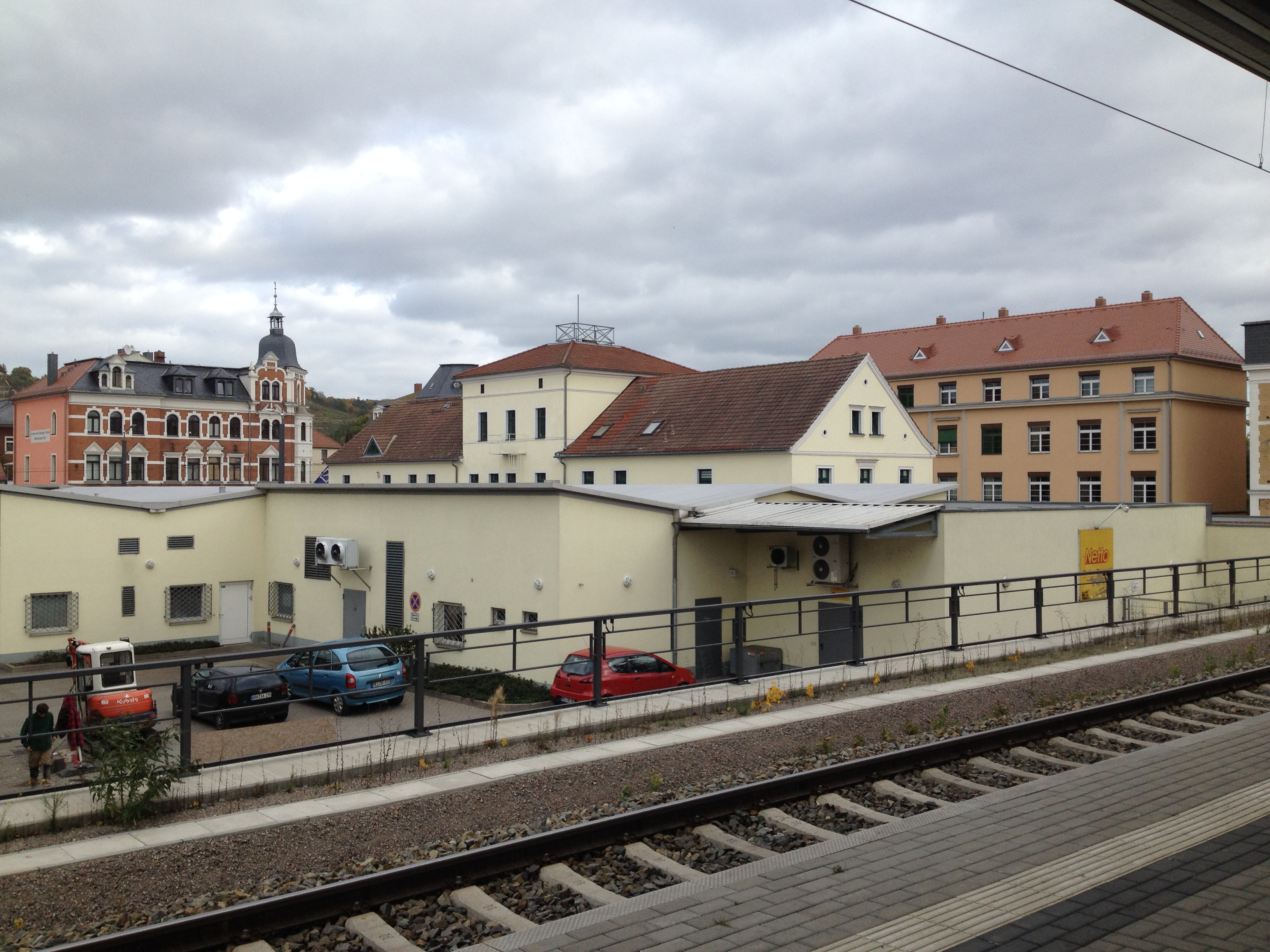 Lößnitzperle